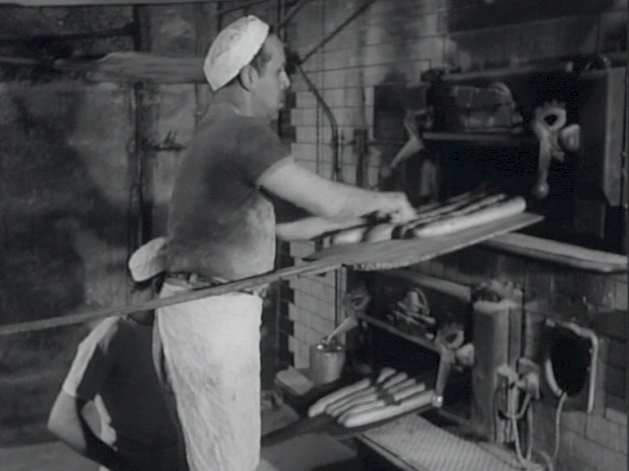 Sortie du four des premières baguettes de la journée.